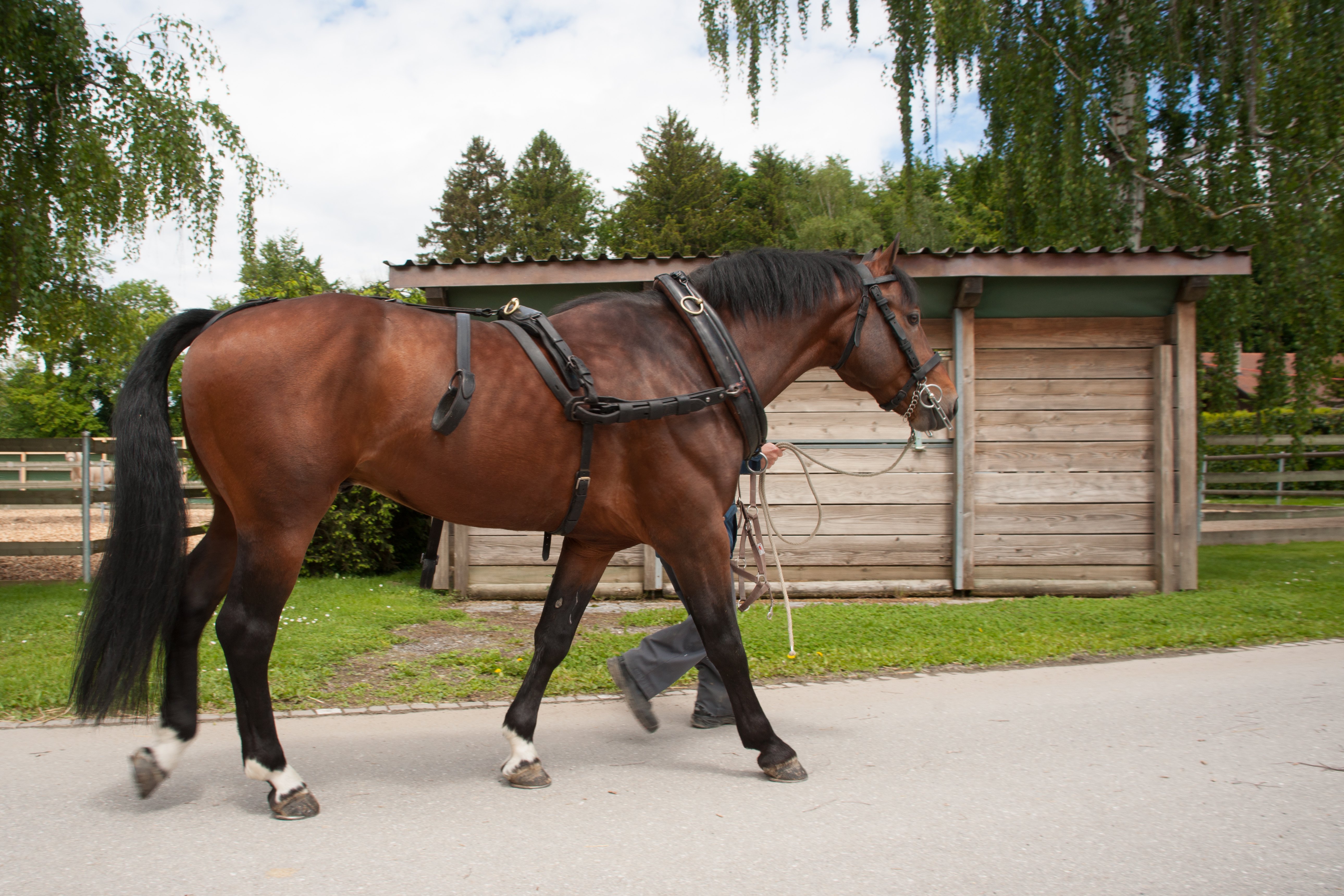 L'étalon Franches montagnes Natif des Aiges au Haras national d'Avenches, Suisse. Né le 25 avril 2001 (par Nico et Julia), c'est un modèle plutôt grand, adapté à l'attelage